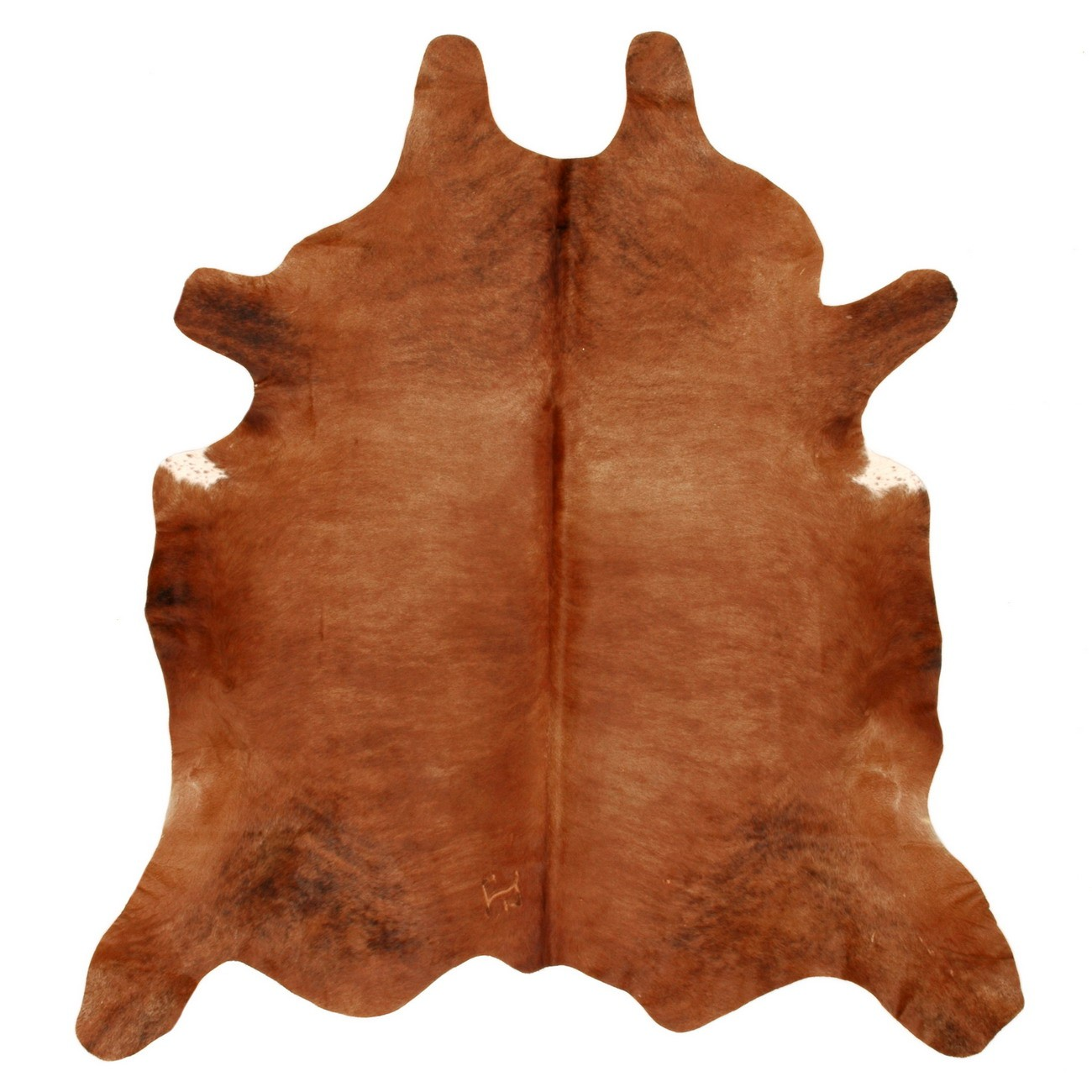 Cuero